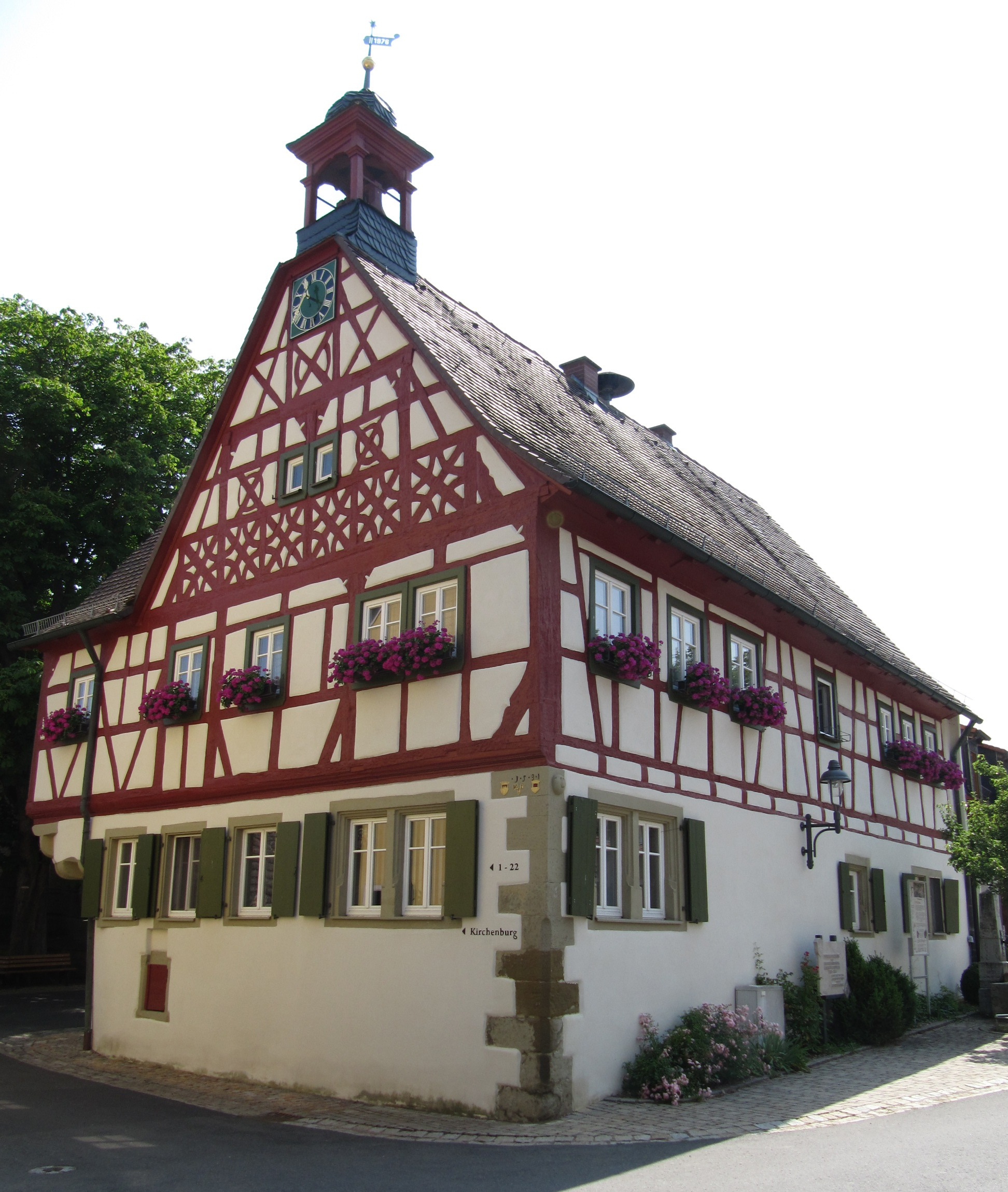 Rathaus mit markantem Eckstein